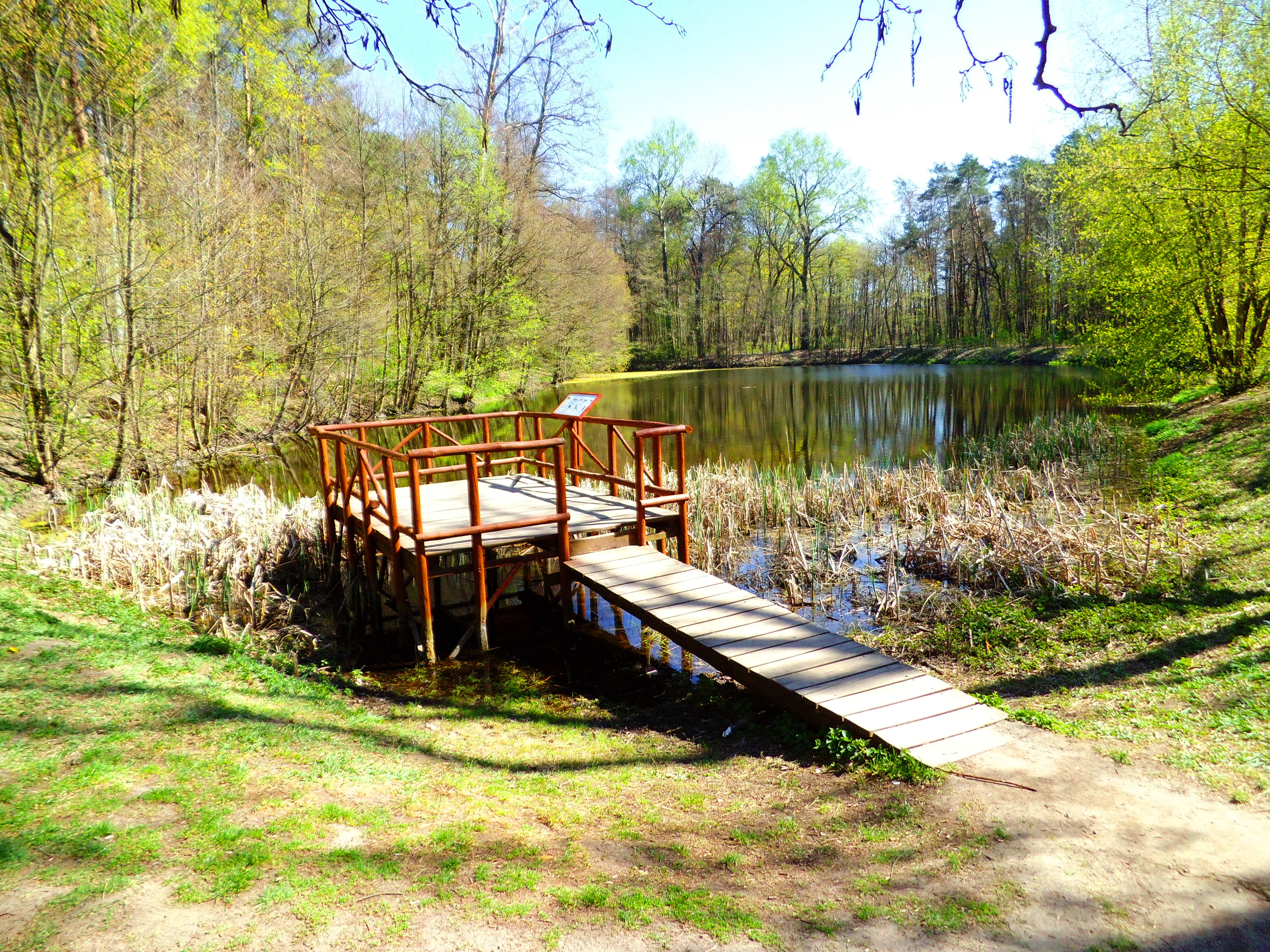 Staw na Barbarce, Toruń